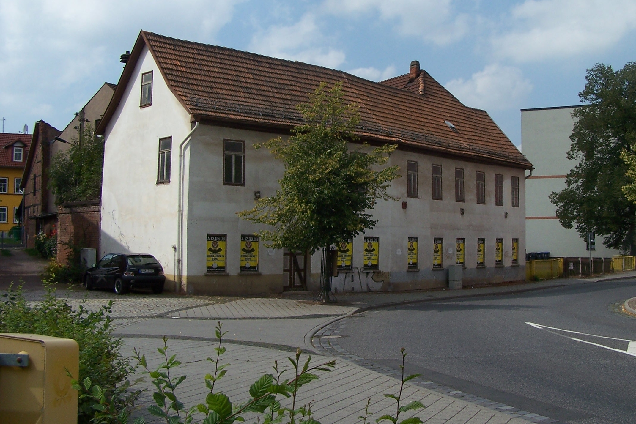 Hauptgebäude des ehemaligen Wirtshauses.